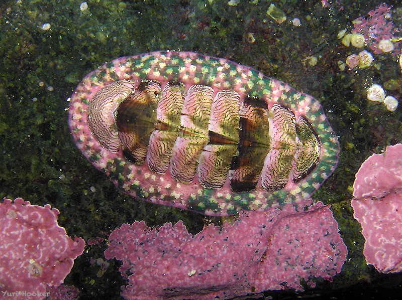 Tonicia elegans, uno de los chitones más comunes de la costa de Perú. En Bahía Samanco, Ancash, Perú